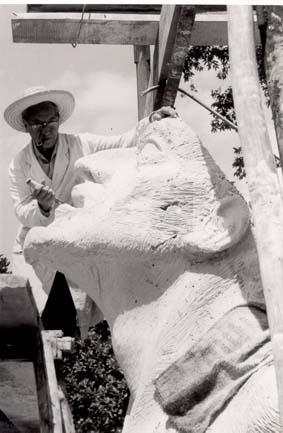 Jorge Marín Vieco creando el "Hombre en Busca de la Paz", monumento en bronce de 15 m de altura ubicado en el Cementerio Campos de Paz, Medellín.